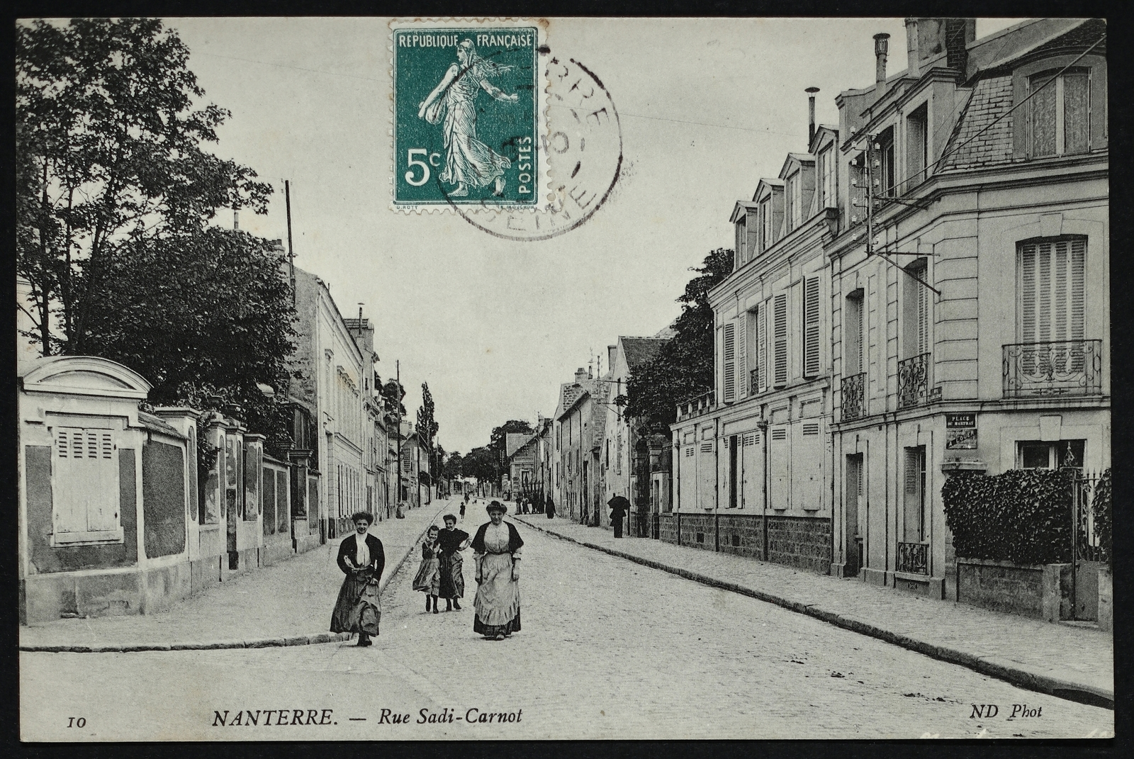 Nanterre.Rue Sadi-Carnot.Perspective